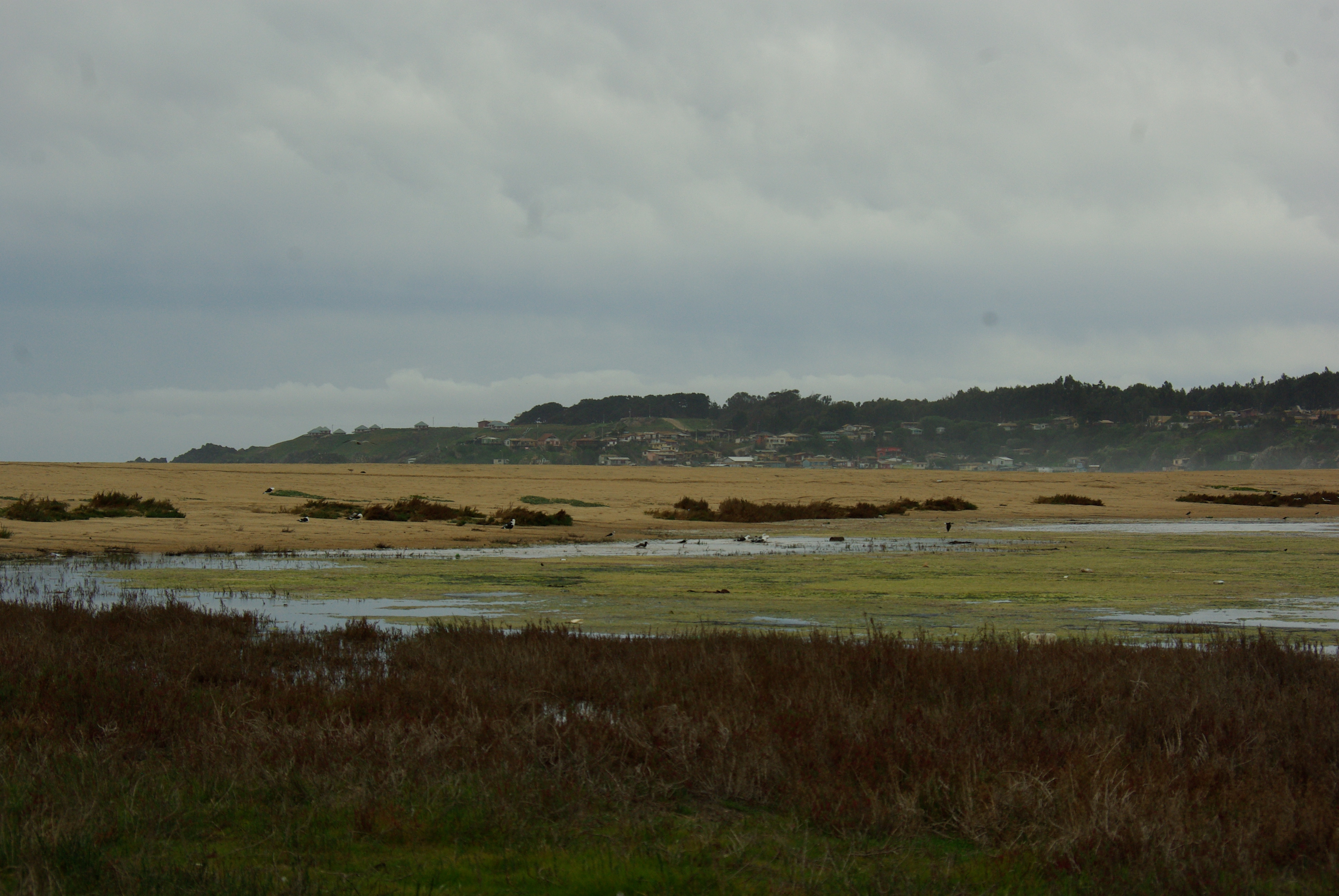 Cerca de playa Huaquén